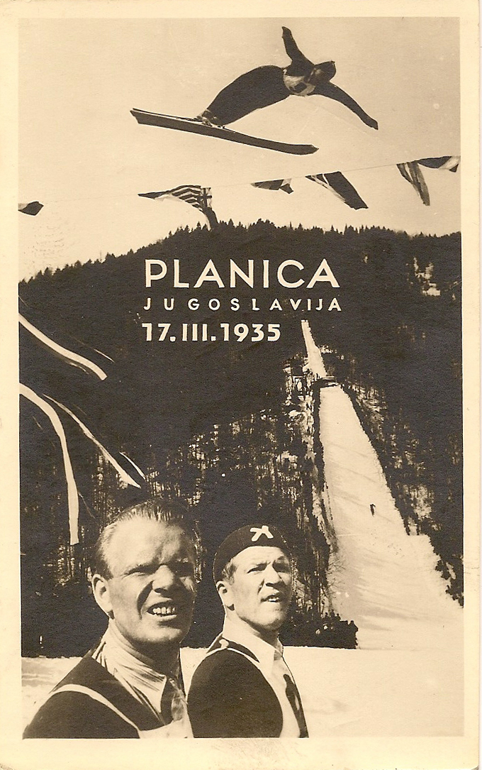 Brata Ruud pod Bloudkovo velikanko.